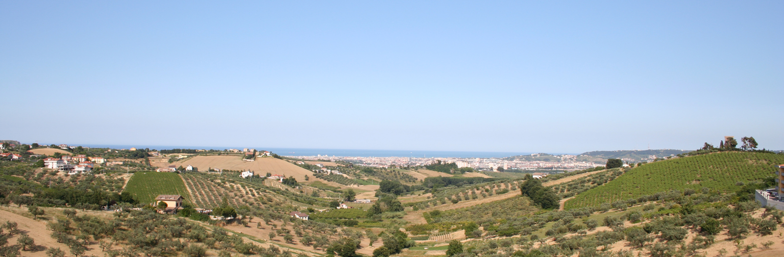 Spoltore vista panoramica su Pescara, Italy